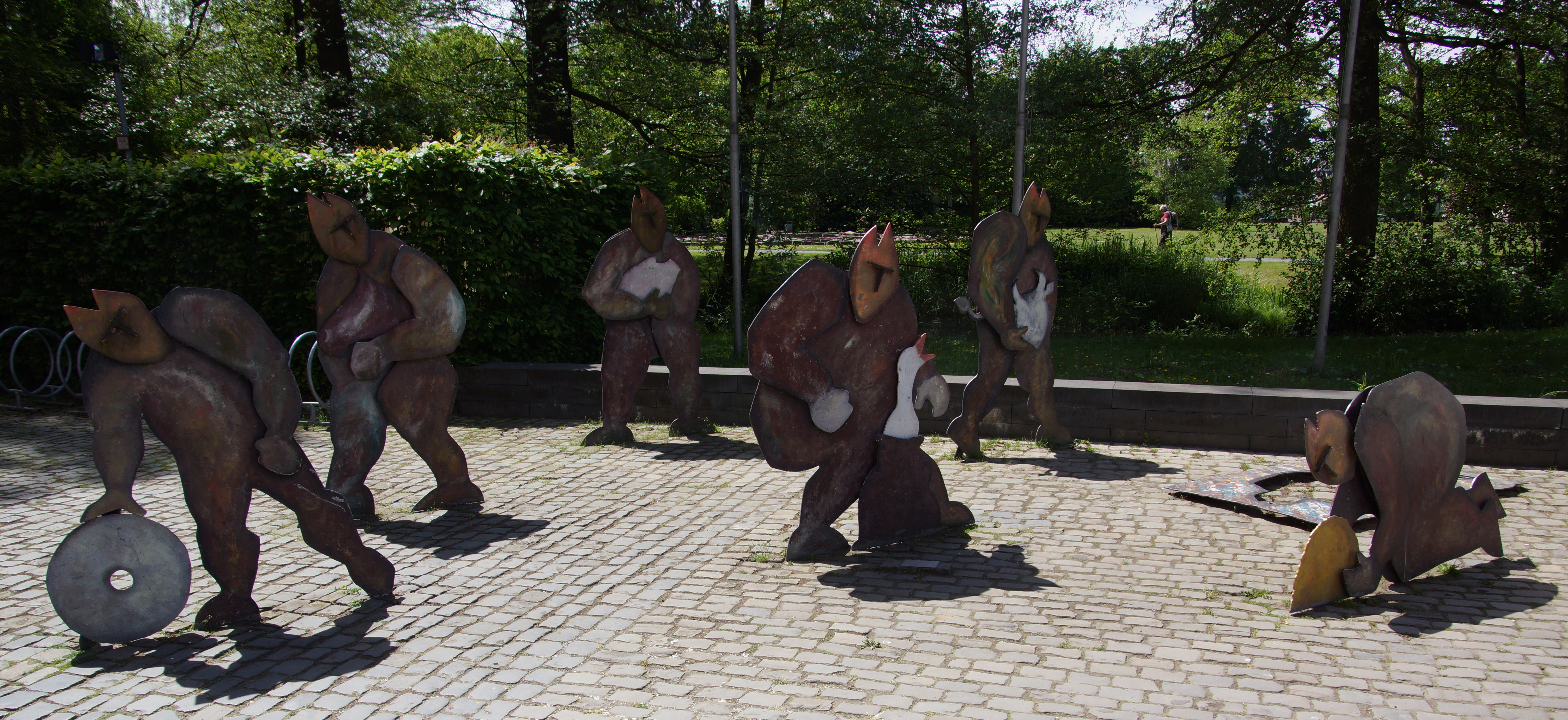 Die 1990 im Rahmen des Künstler-Symposiums geschaffene Skulpturengruppe Hans im Glück von Tor Michael Sönksen im Burghof von Burg Wissem in Troisdorf